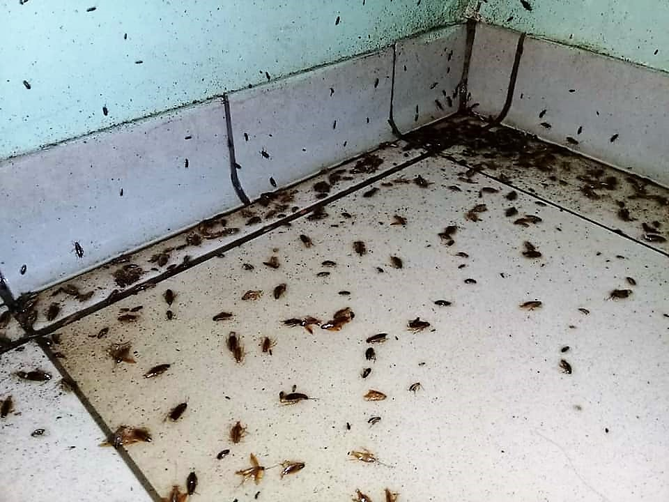 Opfer einer Schädlingsbekämpfungsaktion im Hospital Nacional Guido Valadares, Dili Osttimor